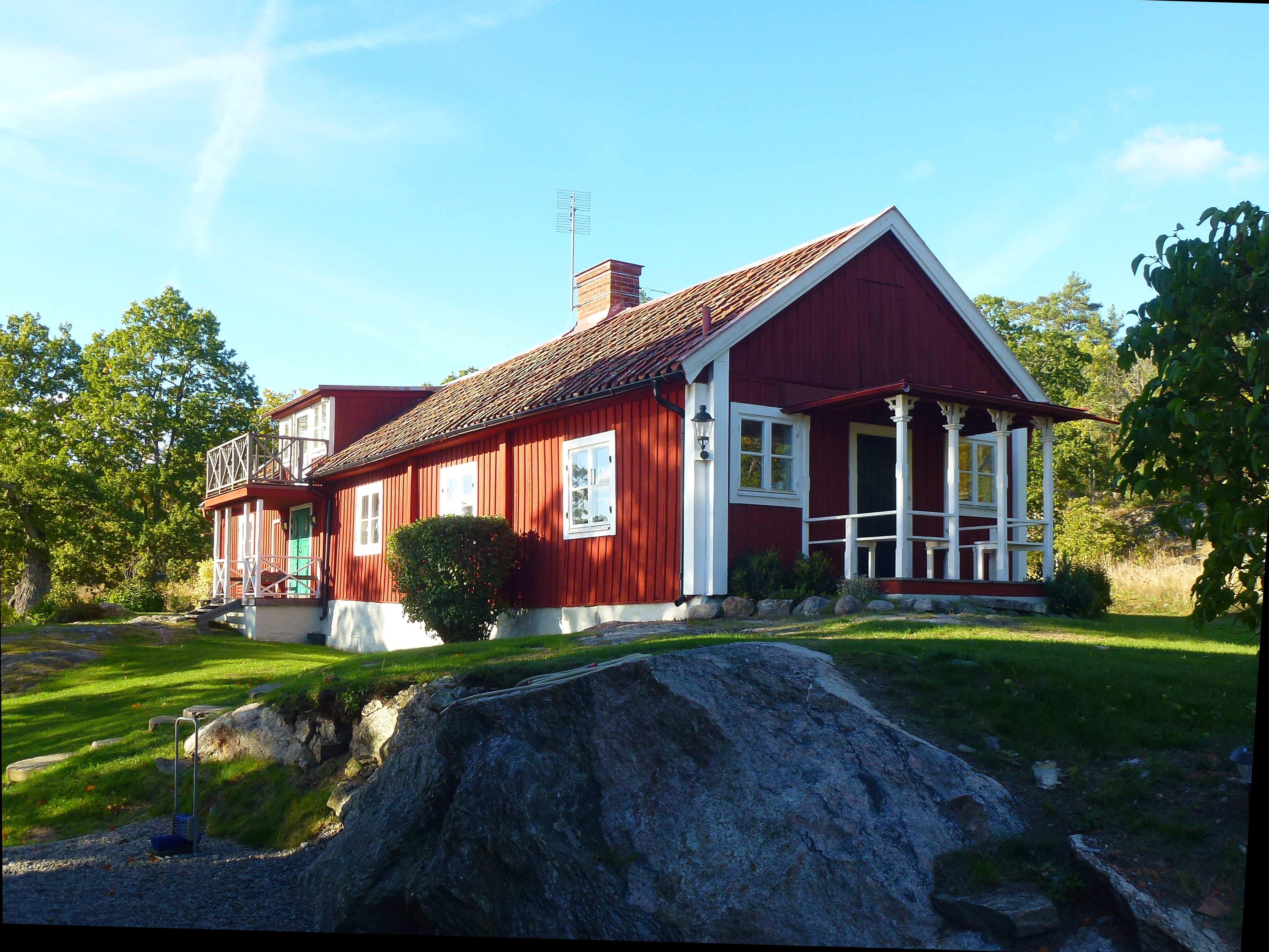 Erstaviks kvarns mjölnarstuga